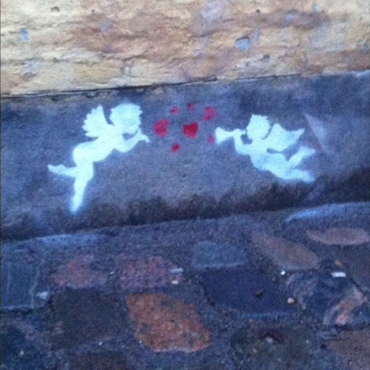 streetart stencils set ud for Fugholm 12, 8700 Horsens